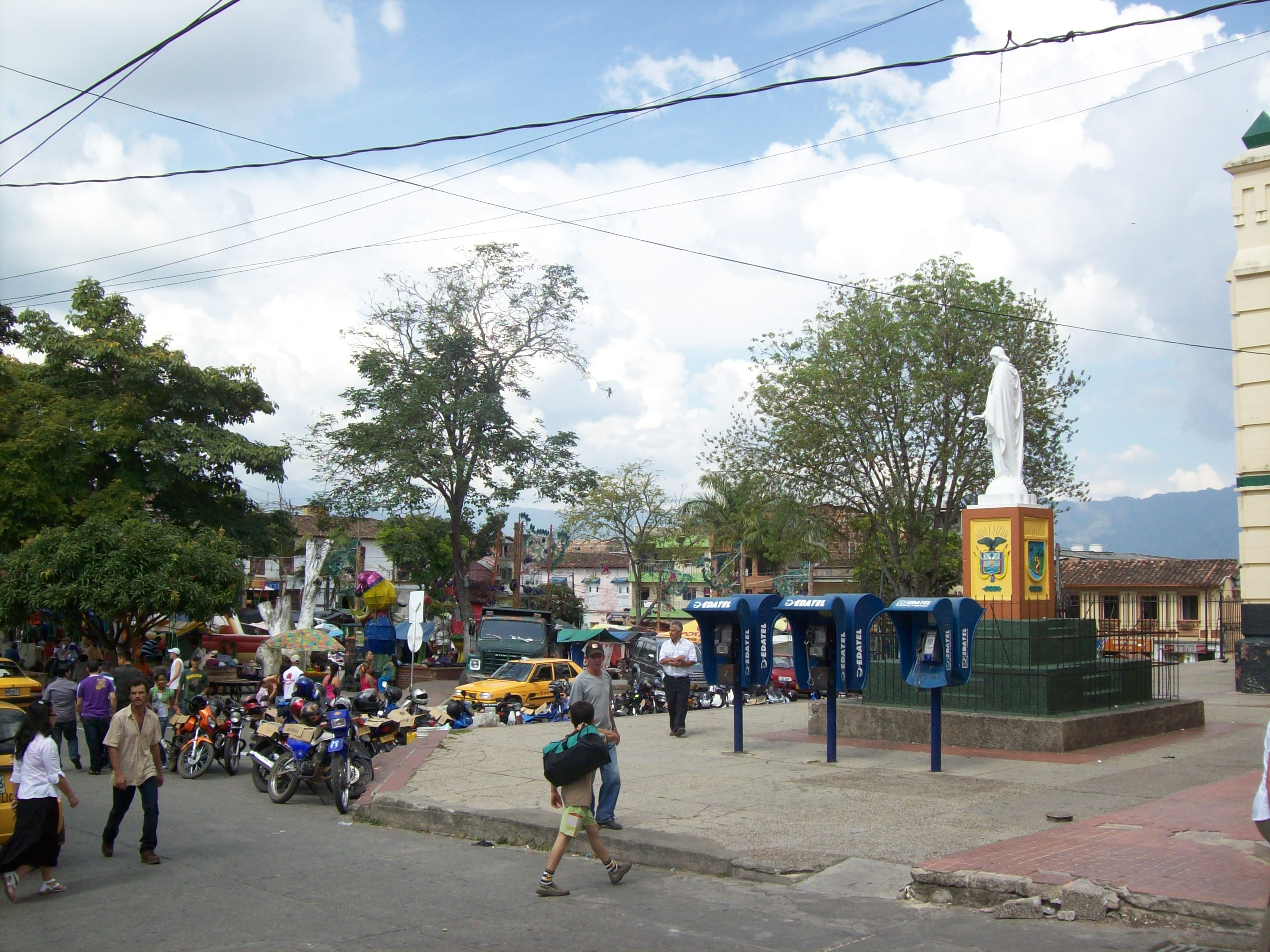 Esquina del parque de Santa Bárbara, Antioquia.